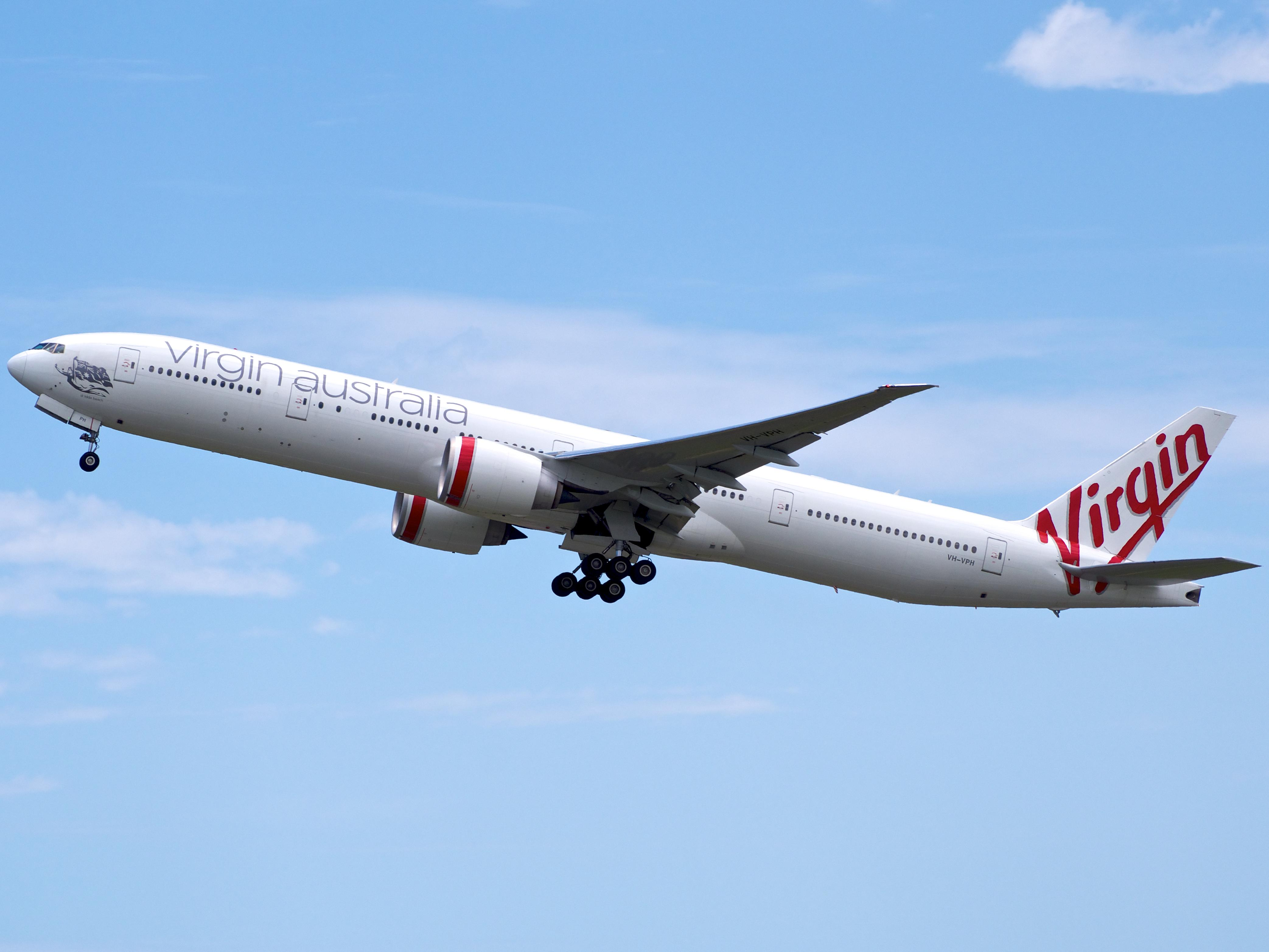 VH-VPH | 777-3ZG ER | Virgin Australia